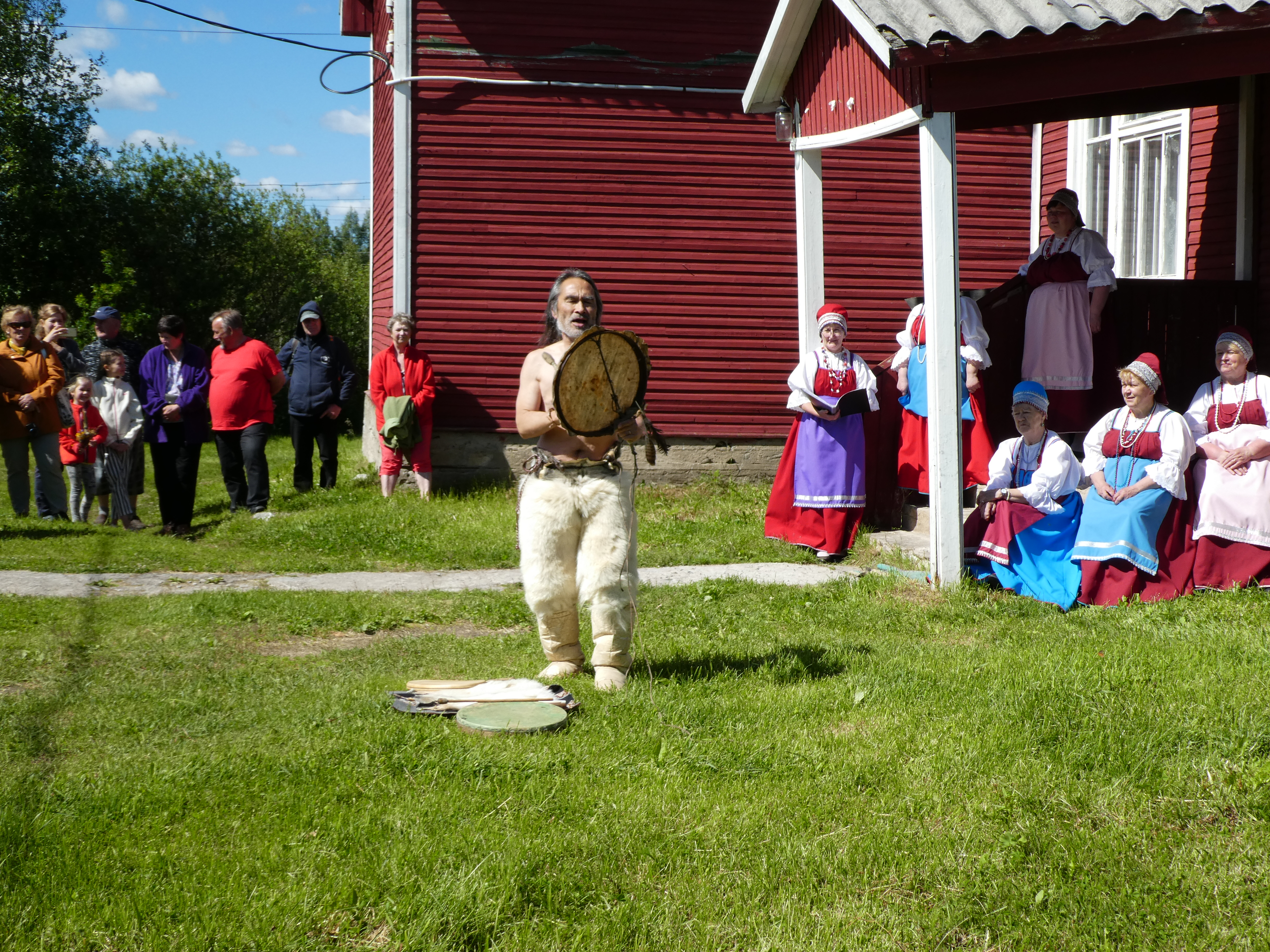 30.6.2019 Jyskyjärven kulttuuritalon edusta, Karjalan tasavalta. Šamaani Hivshu esiintyy jääkarhunnahkahousuissaan. Tautalla paikallinen laulu- ja tanssiryhmä Tuomi